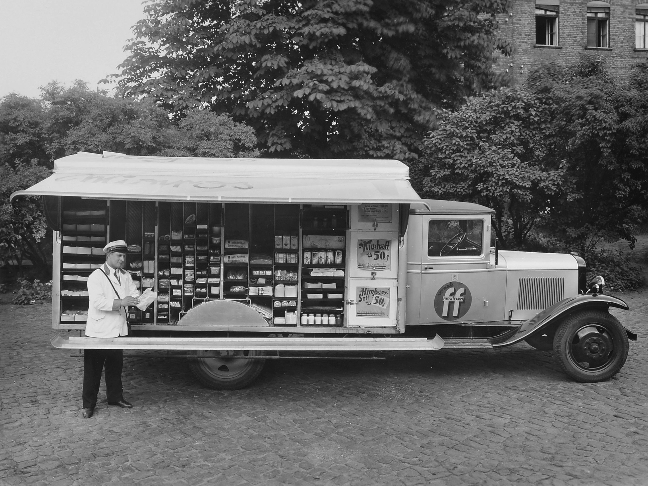 Migros Berlin: Verkaufswagen offen mit Chauffeur